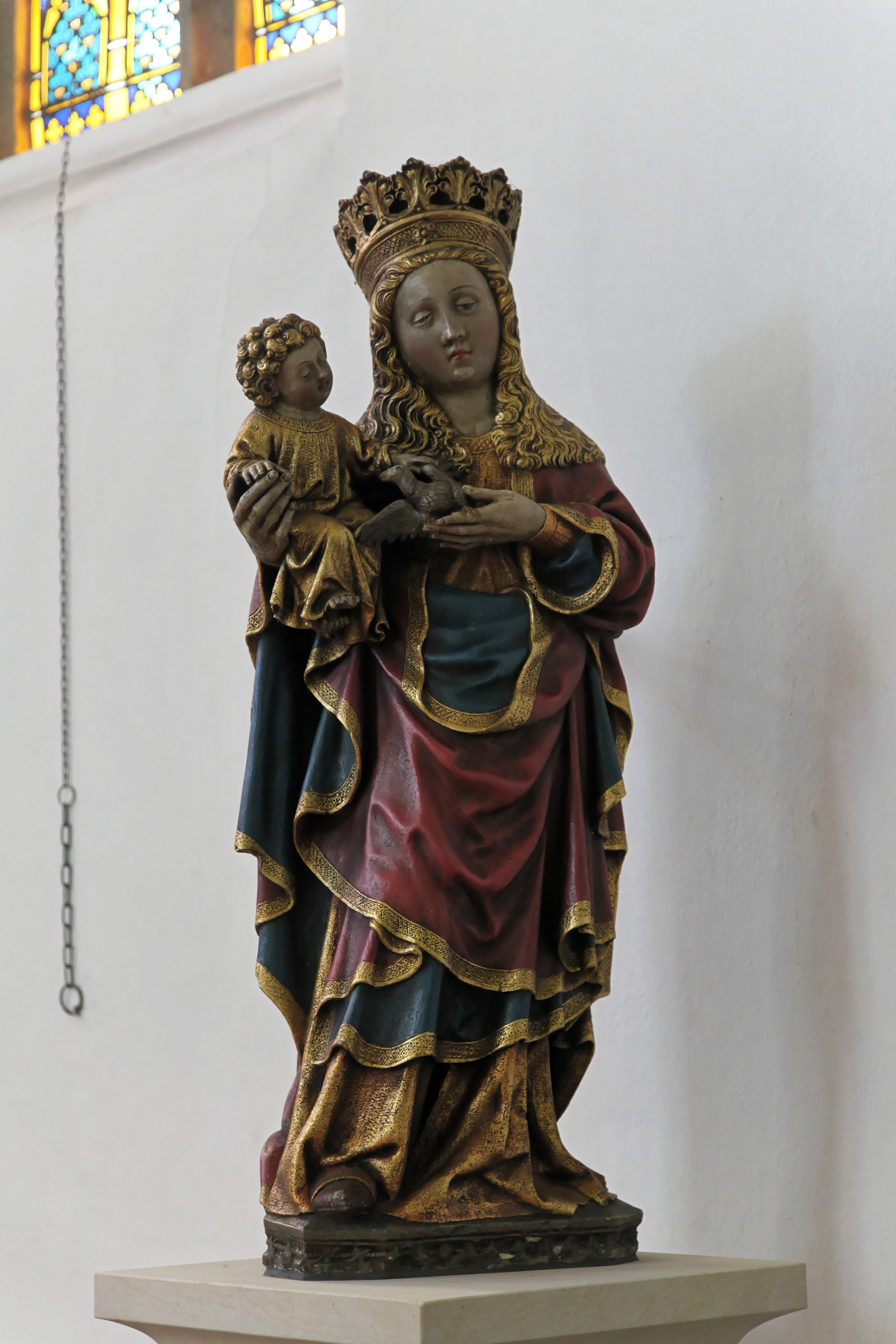 Madonna der Fahrensleute in der St.-Georg-Kirche, Kirchstraße in Steinbild, Kluse (Emsland)